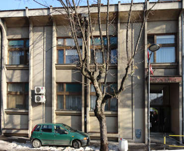 Mузичка школа "Коста Манојловић", аутор Радивој Лазић, лични рад, 17. 12. 2012. године.